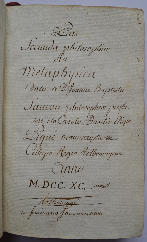 Page de titre du manuscrit de Charles Basile Eloi Pigné intitulé Pars seconda philosophiae seu Metaphysica [..]. Notes prises lors du suivi de l'enseignement du professeur Jean Baptiste Faucon au séminaire Saint-Nicaise de Rouen (France) en 1790. Provenance : "M. Mauchretien" de 1791 à ? ; "Adolphe" de ? à 1909 ; Librairie ancienne et moderne Frérot à Caen de 19.. à 1999 ; Pierre Tribhou depuis 1999